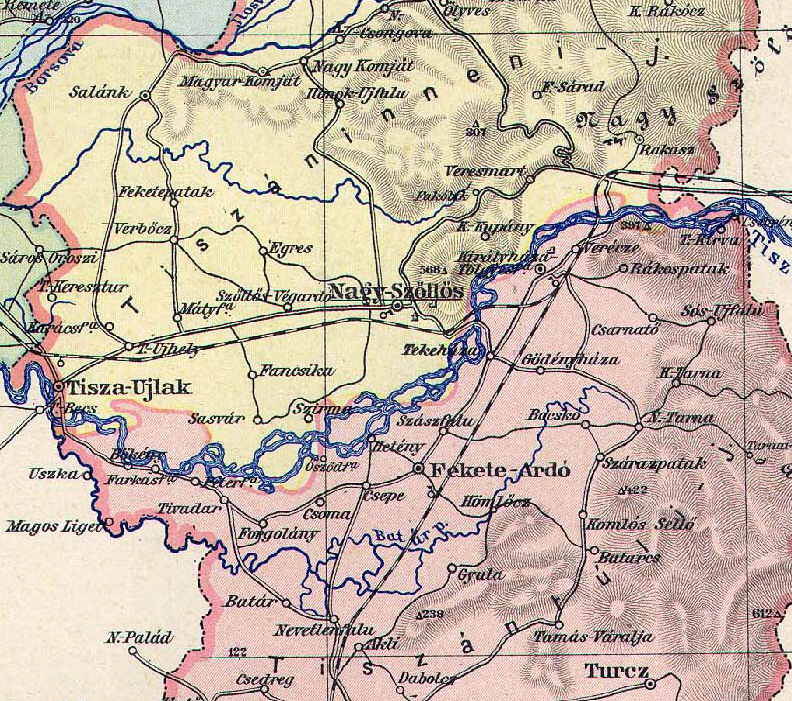 Ugocsa vármegye térképe (részlet). Tiszaújlak és környéke a 20. sz. elején.